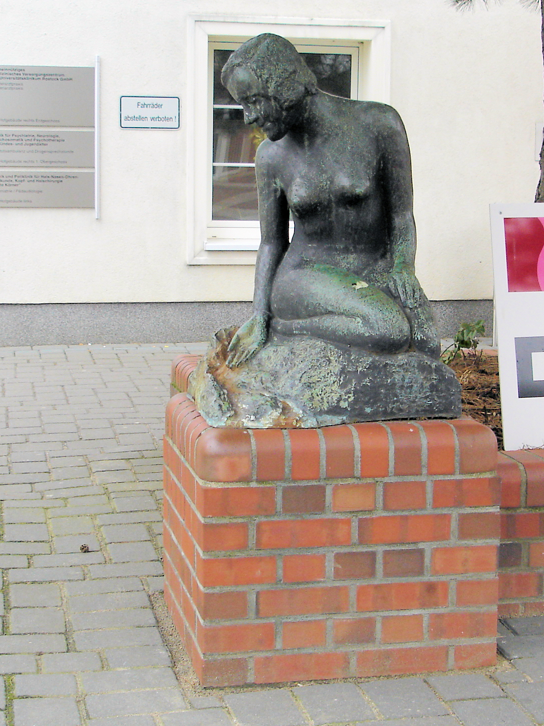 Bronzeplastik "Sitzende" Doberaner Str. Rostock